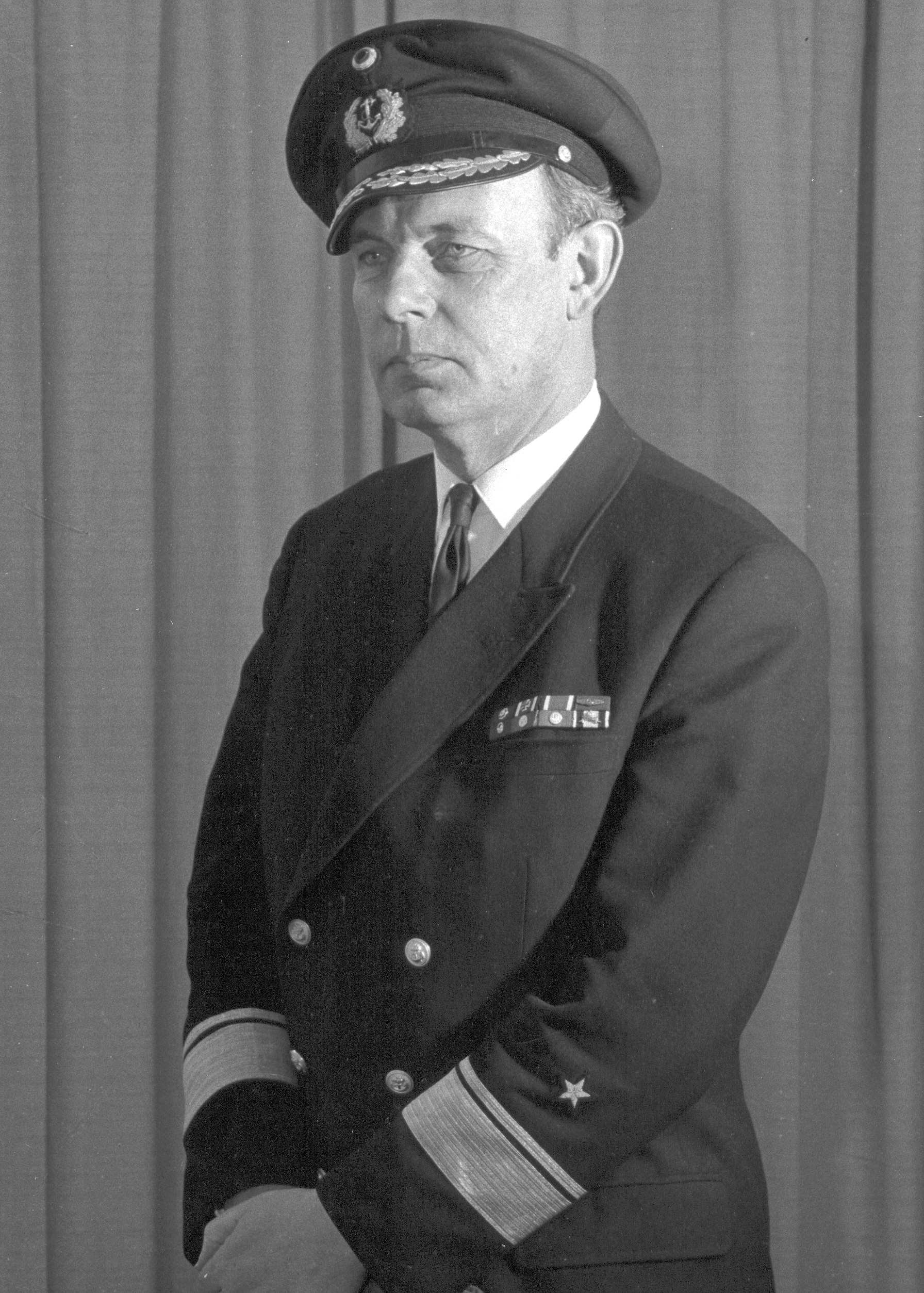 Porträtfotografie von Flottillenadmiral Heinrich Erdmann